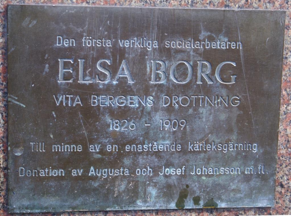 Plakett till Astri Bergman-Taubes staty på Elsa Borg